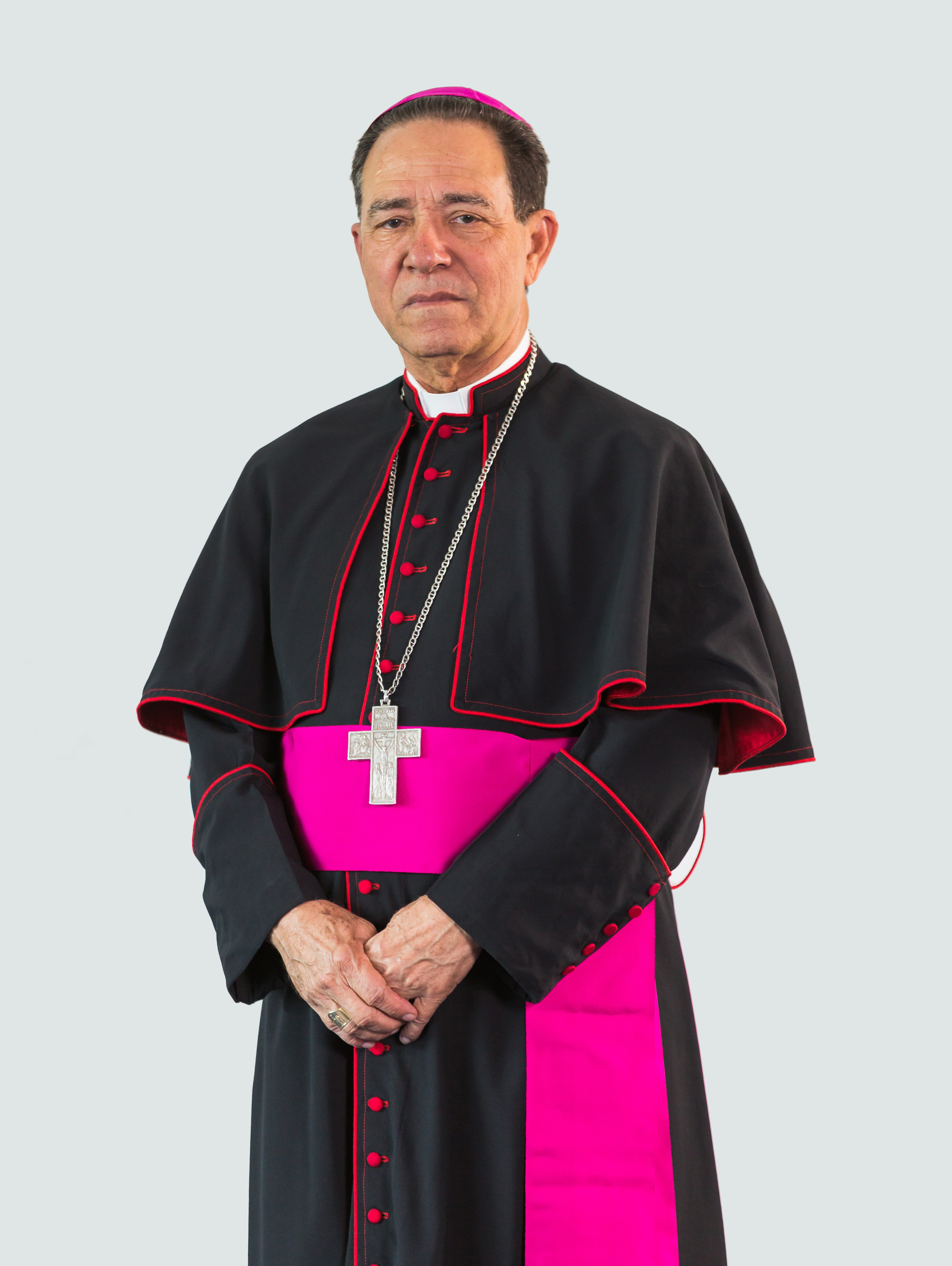 Obispo Gregorio Nicanor Peña